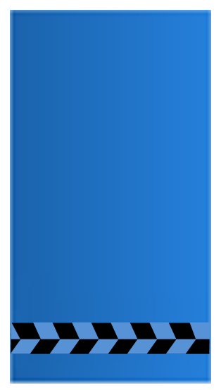 Adjudant blokstrepen (heringevoerd 2017)